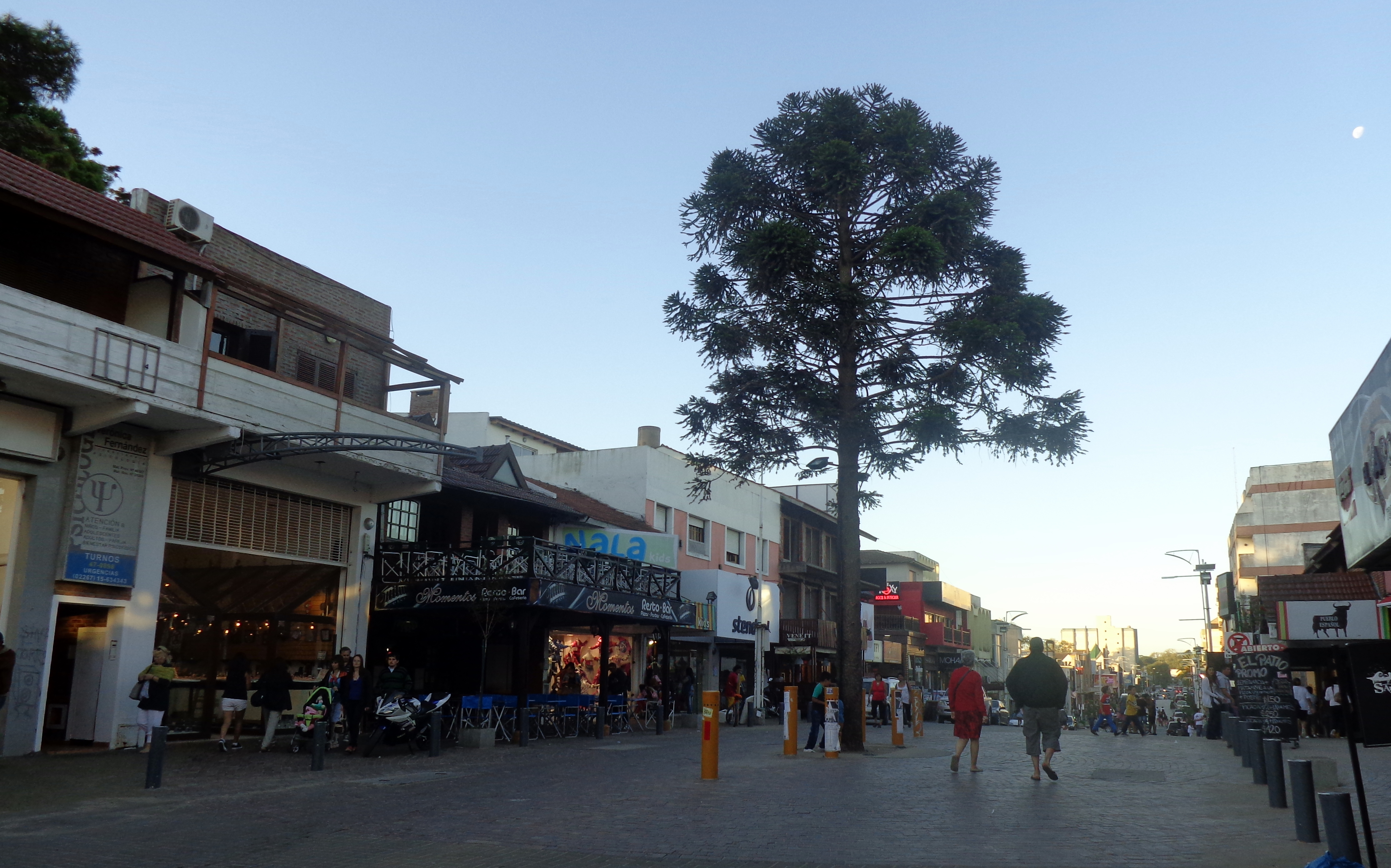 Villa Gesell, Provincia de Buenos Aires, Argentina.